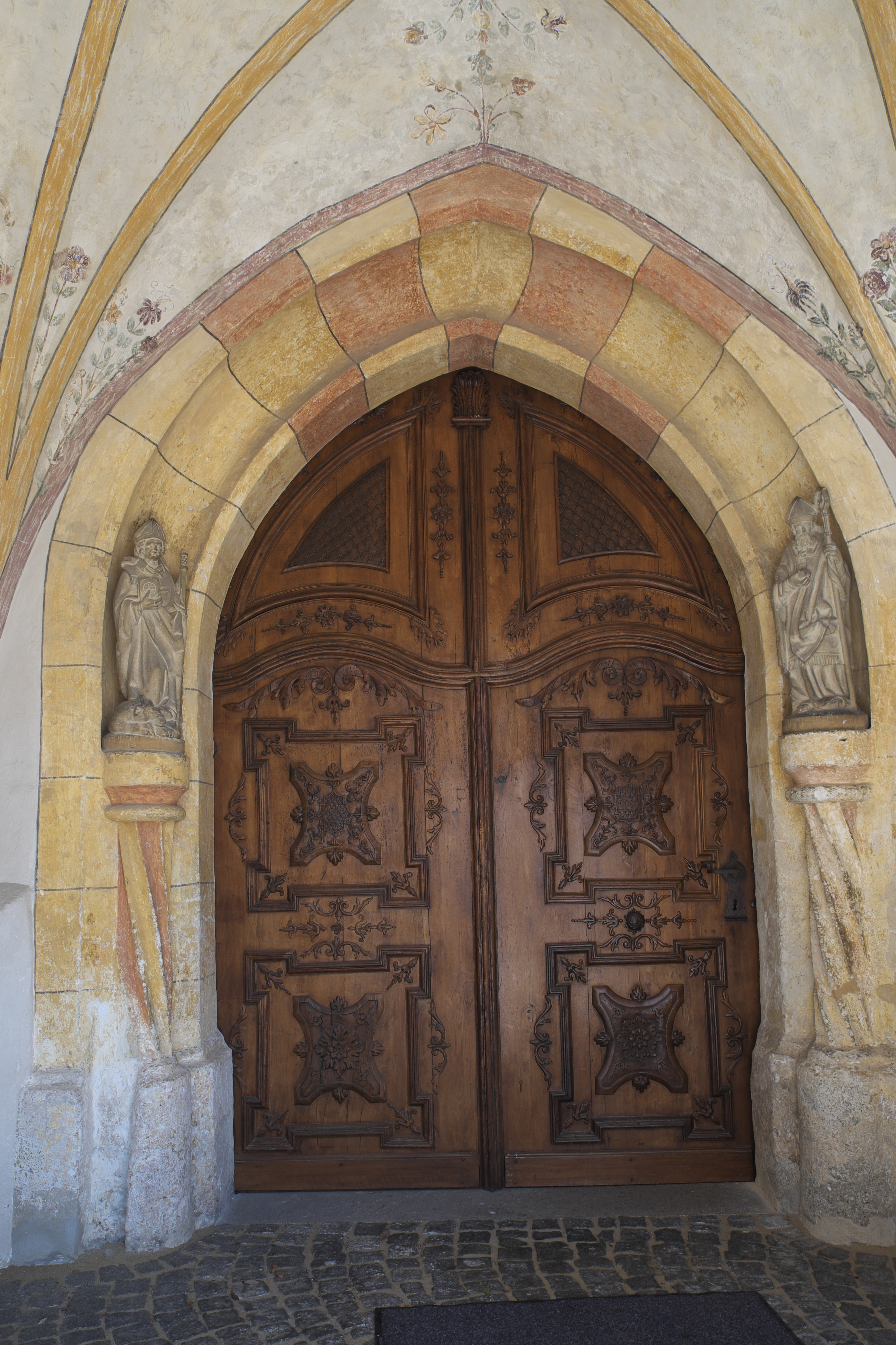 Katholische Pfarr- und Wallfahrtskirche Mariä Himmelfahrt in Aufkirchen, einem Ortsteil der Gemeinde Berg im Landkreis Starnberg (Bayern/Deutschland), spätgotisches Sitzbogenportal